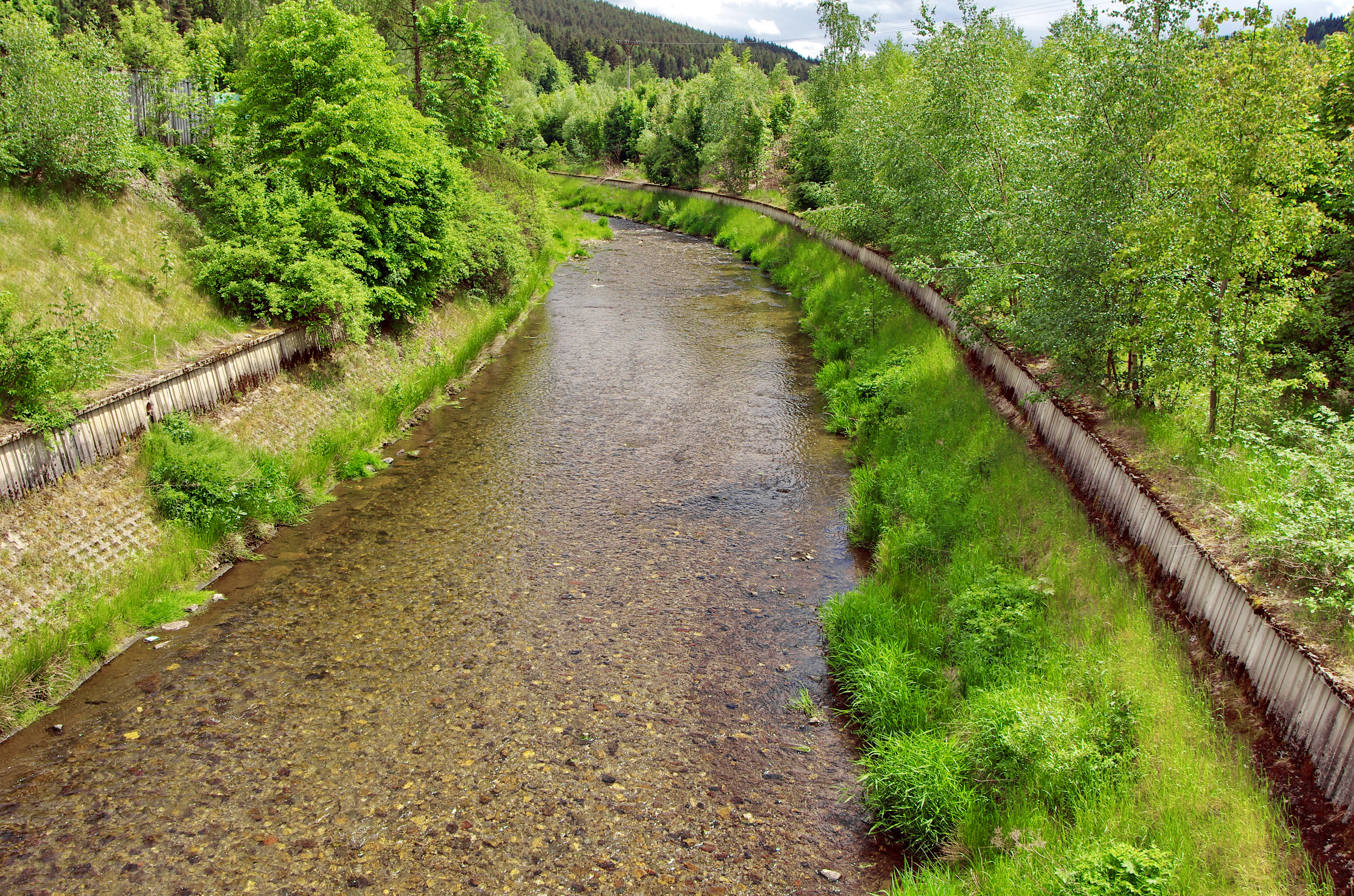 Řeka Svatava v Kraslicích, okres Sokolov